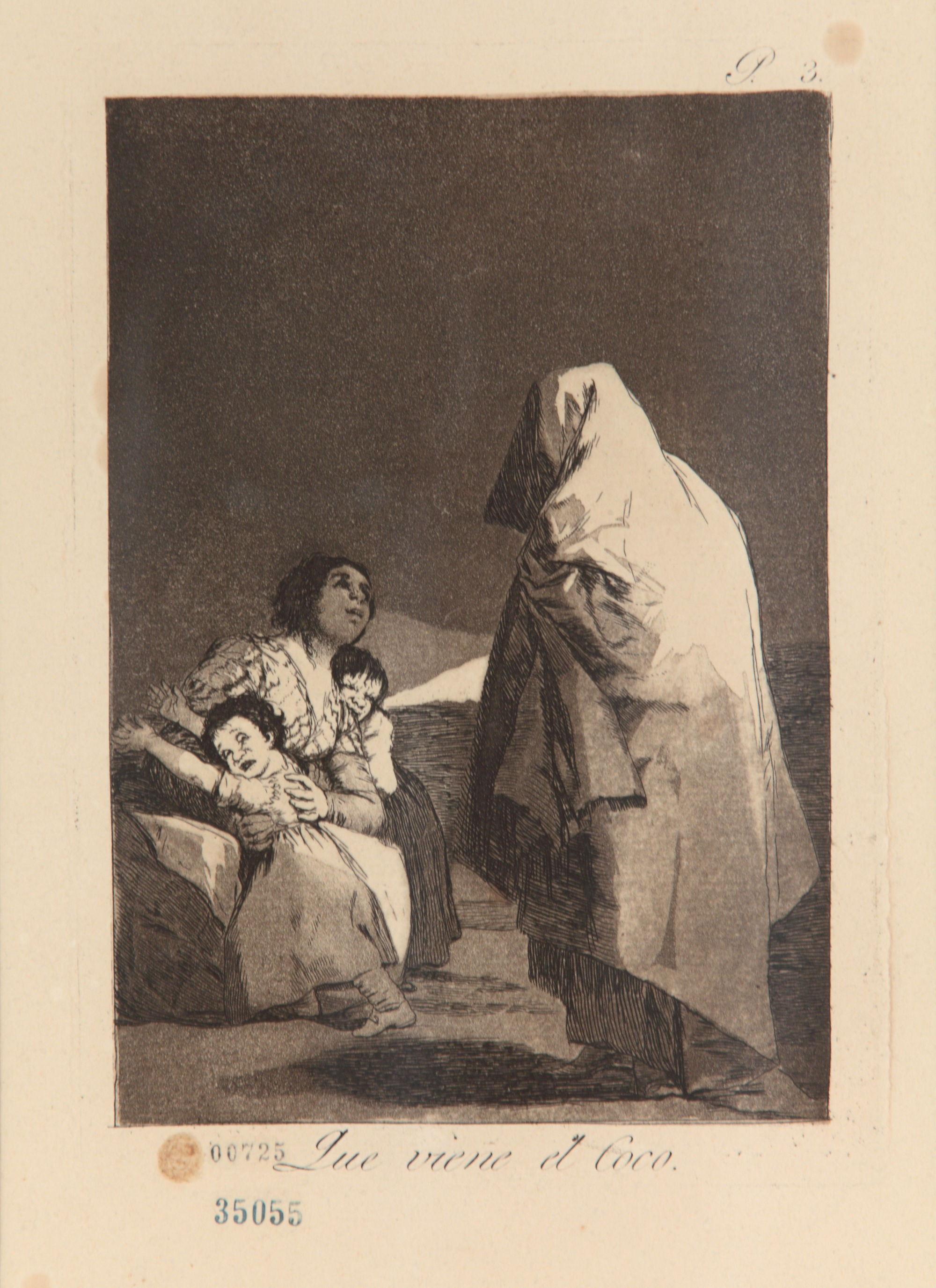 Francisco José de Goya y Lucientes, Que viene el Coco (Serie Caprichos). Siglo XIX. 36 x 26 cm, plancha: 21,7 x 15,7 cm, aguafuerte sobre papel. Inv. 1138.